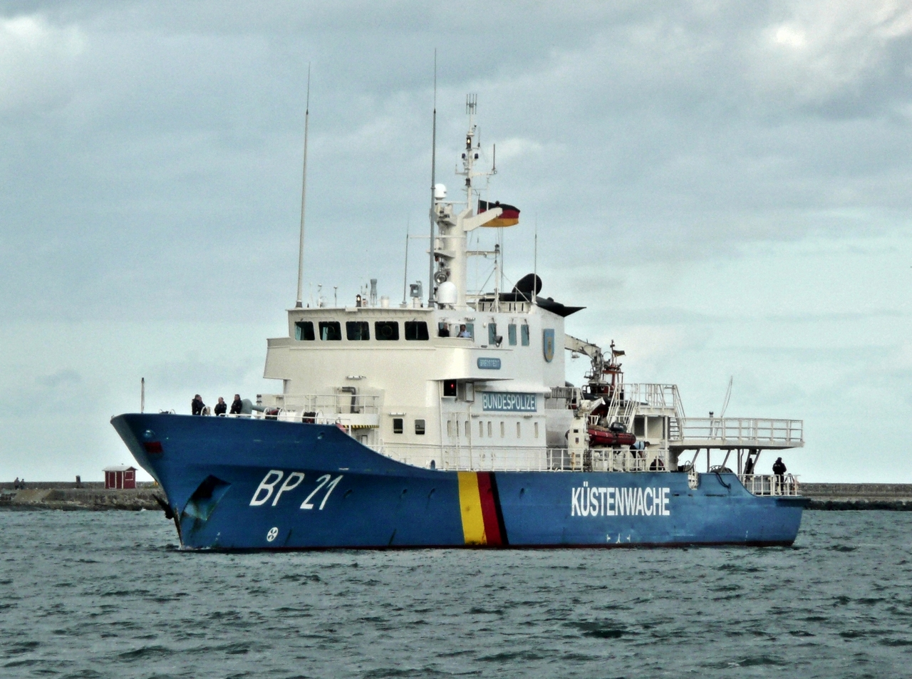 Das Küstenwachschiff BP 21 "Bredstedt" (IMO 8986896) in Rostock-Warnemünde.